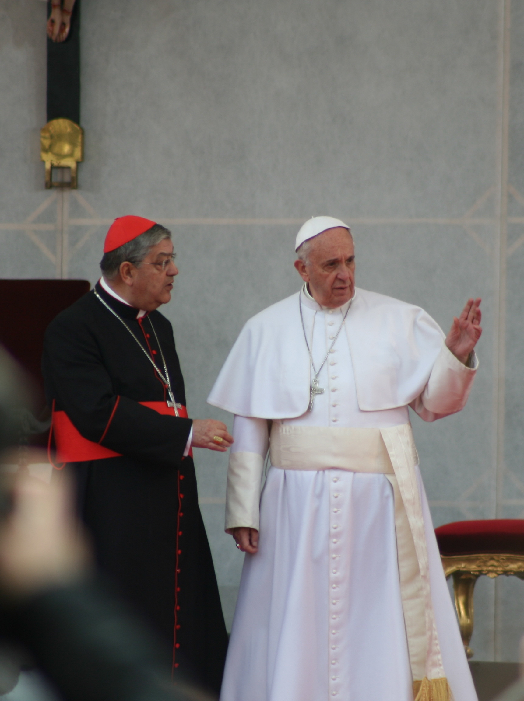 Visite du pape François à Naples le 21 mars 2015